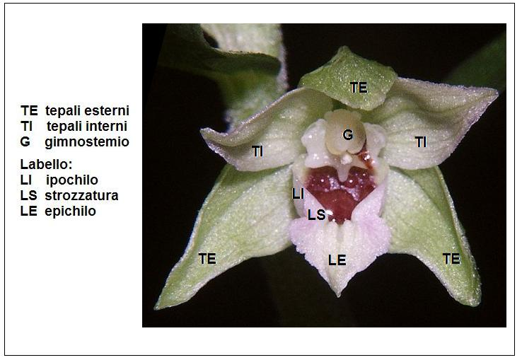 Epipactis muelleri